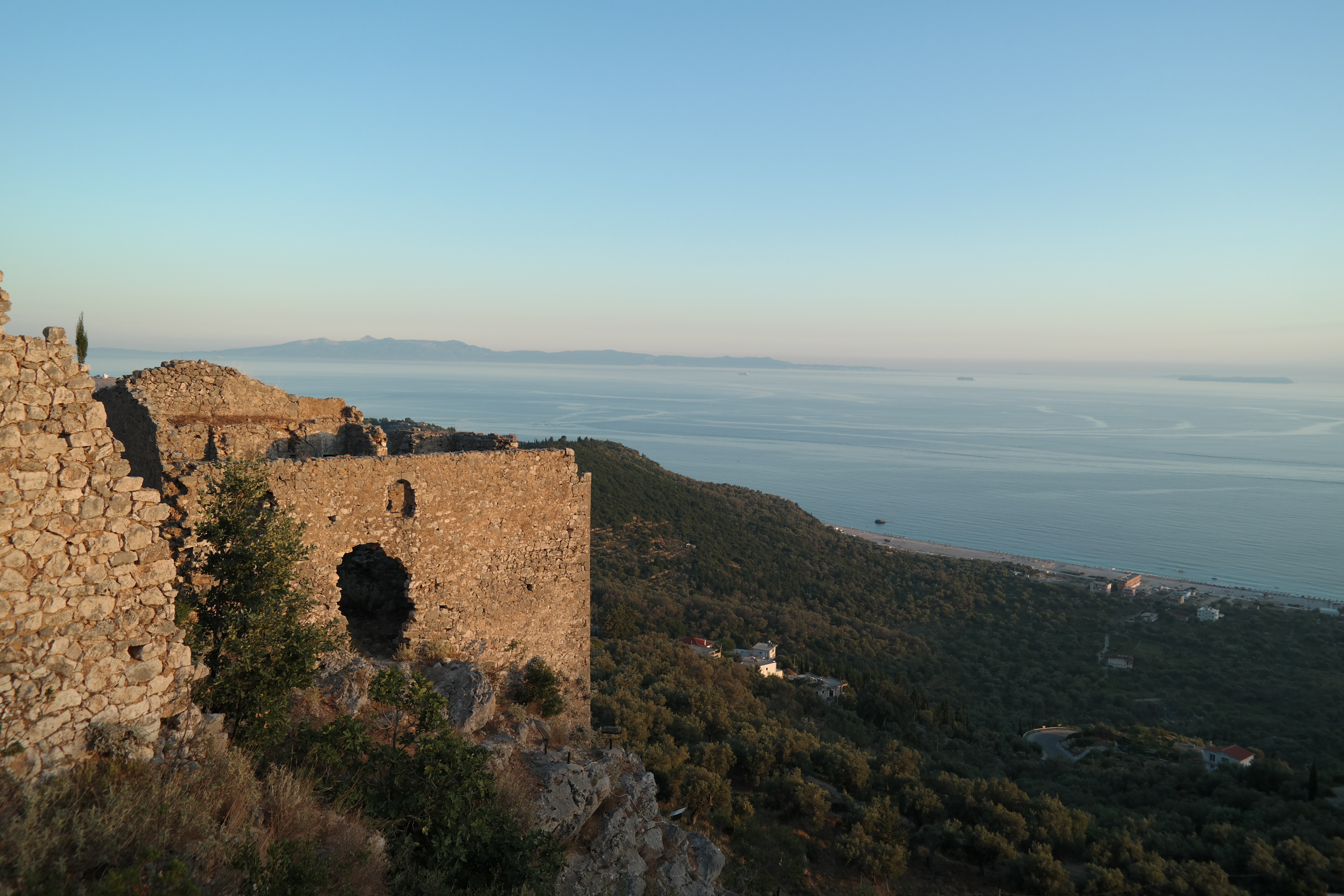 Pamje nga Kalaja e Himares buze mbremje